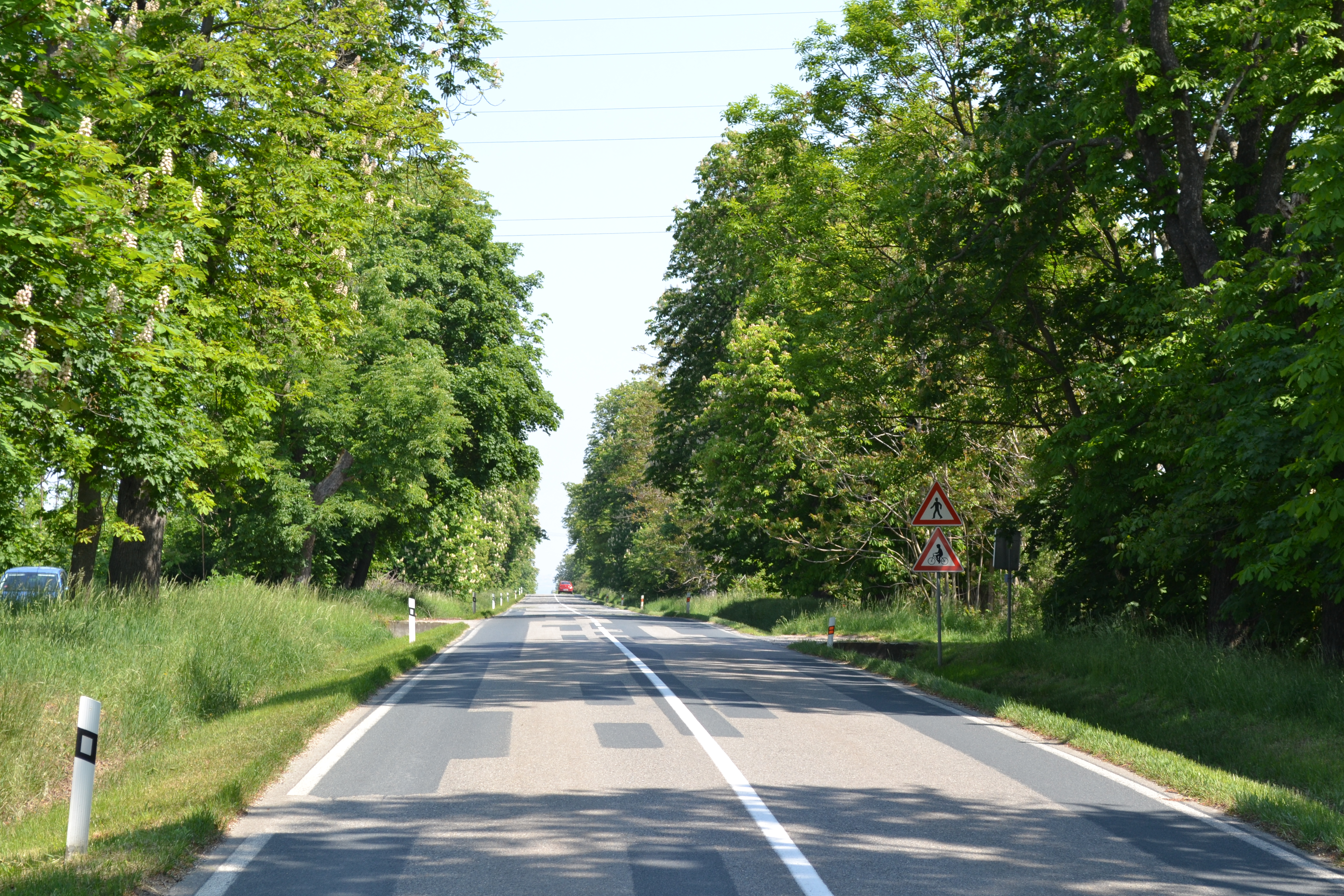 Bezručova alej mezi Lednicí a Valticemi, okres Břeclav. Prochází jí silnice II/422.